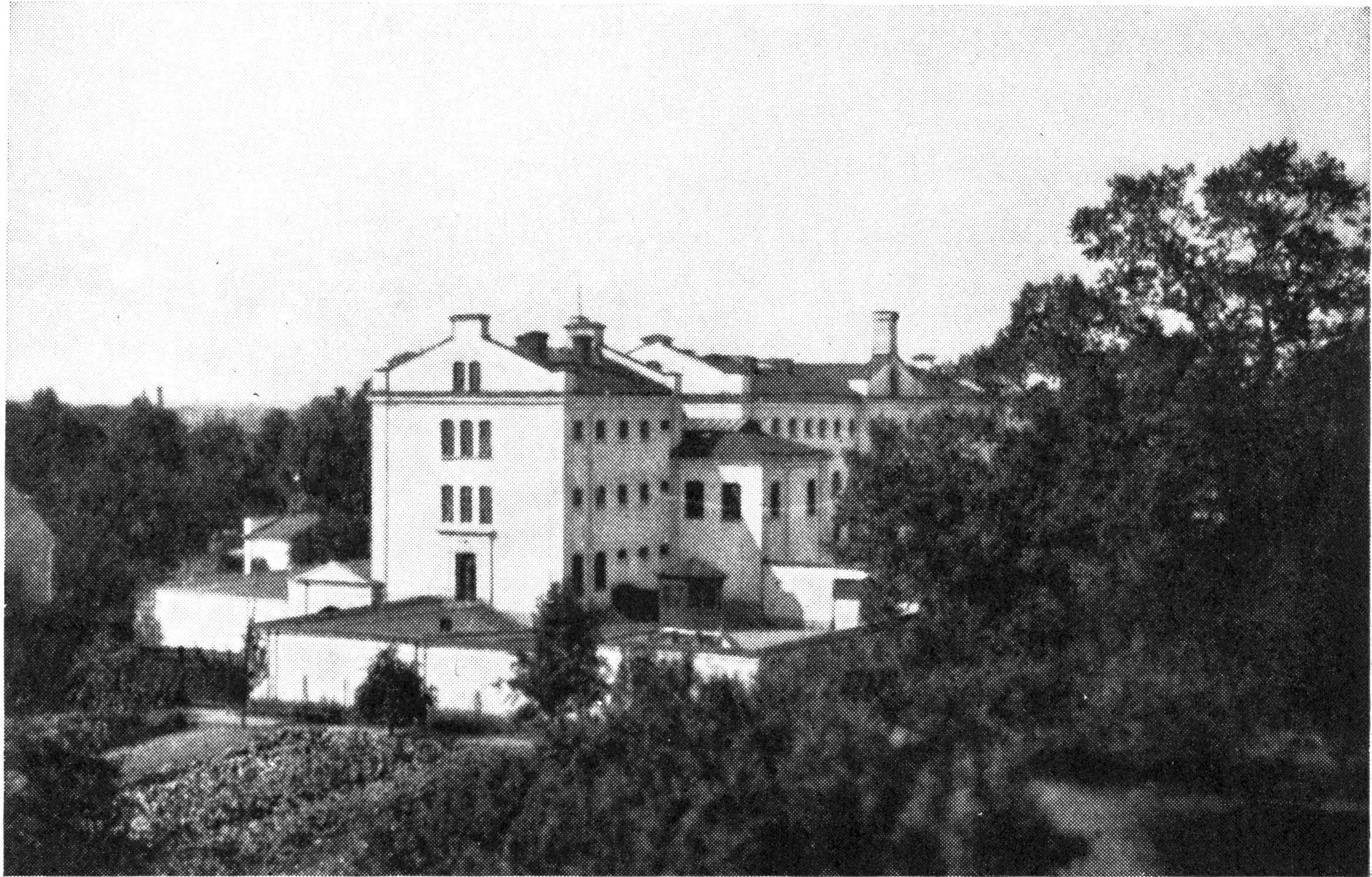 Länsfängelset i Växjö